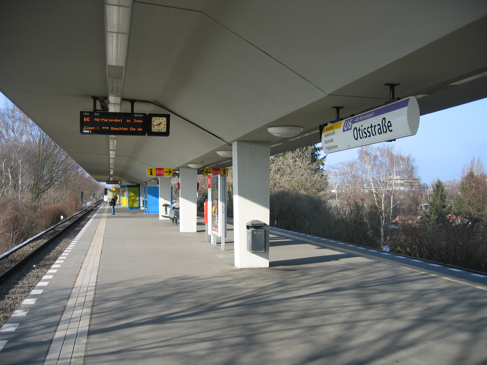 U-Bahnhof Otisstraße, Berlin